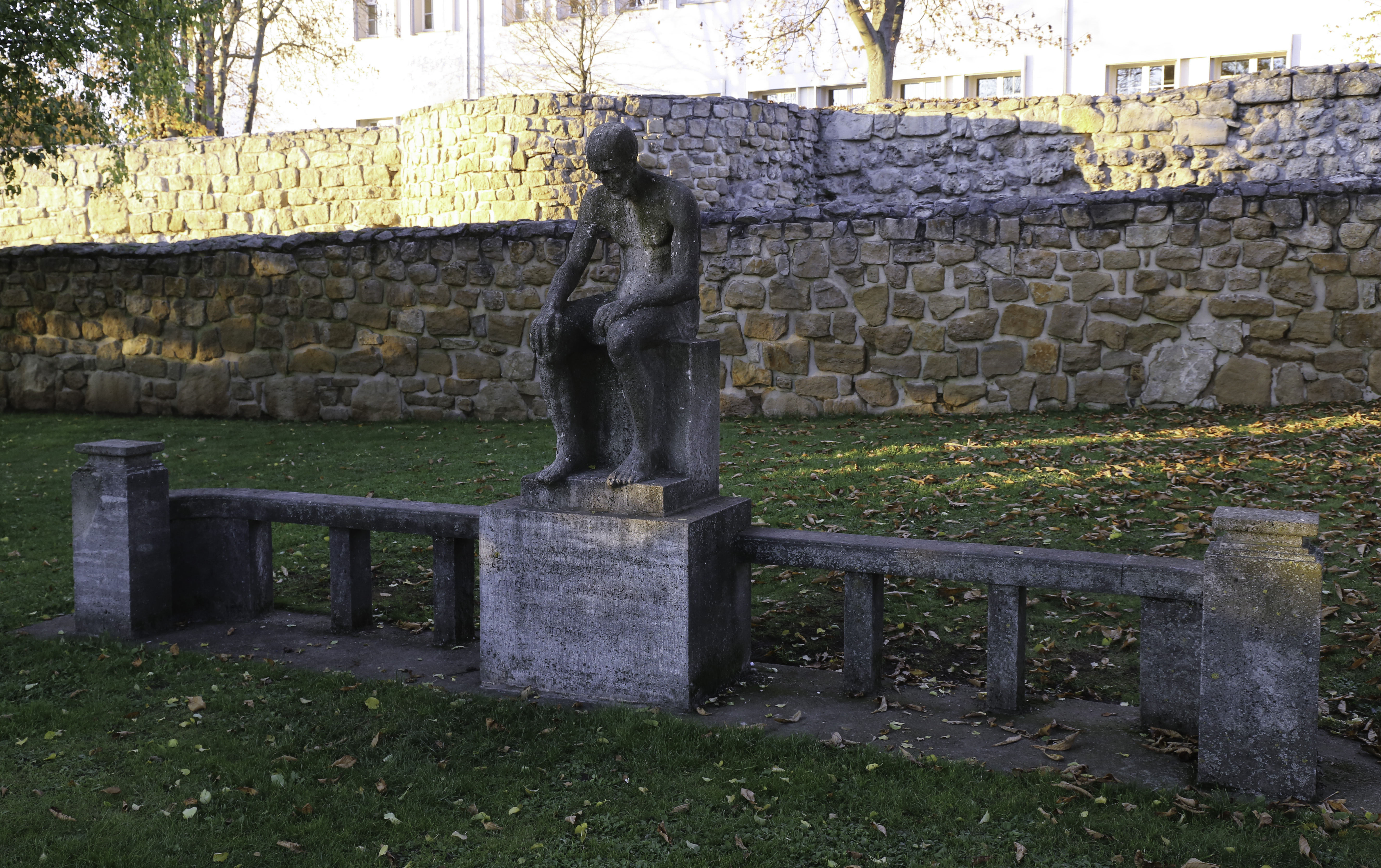 Plastik eines Mannes, der den Kopf trauernd gesenkt hat. Inschrift: "Zum Gedenken an die Toten der Bombenangriffe vom 3. und 4. April 1945 am Petersberg".